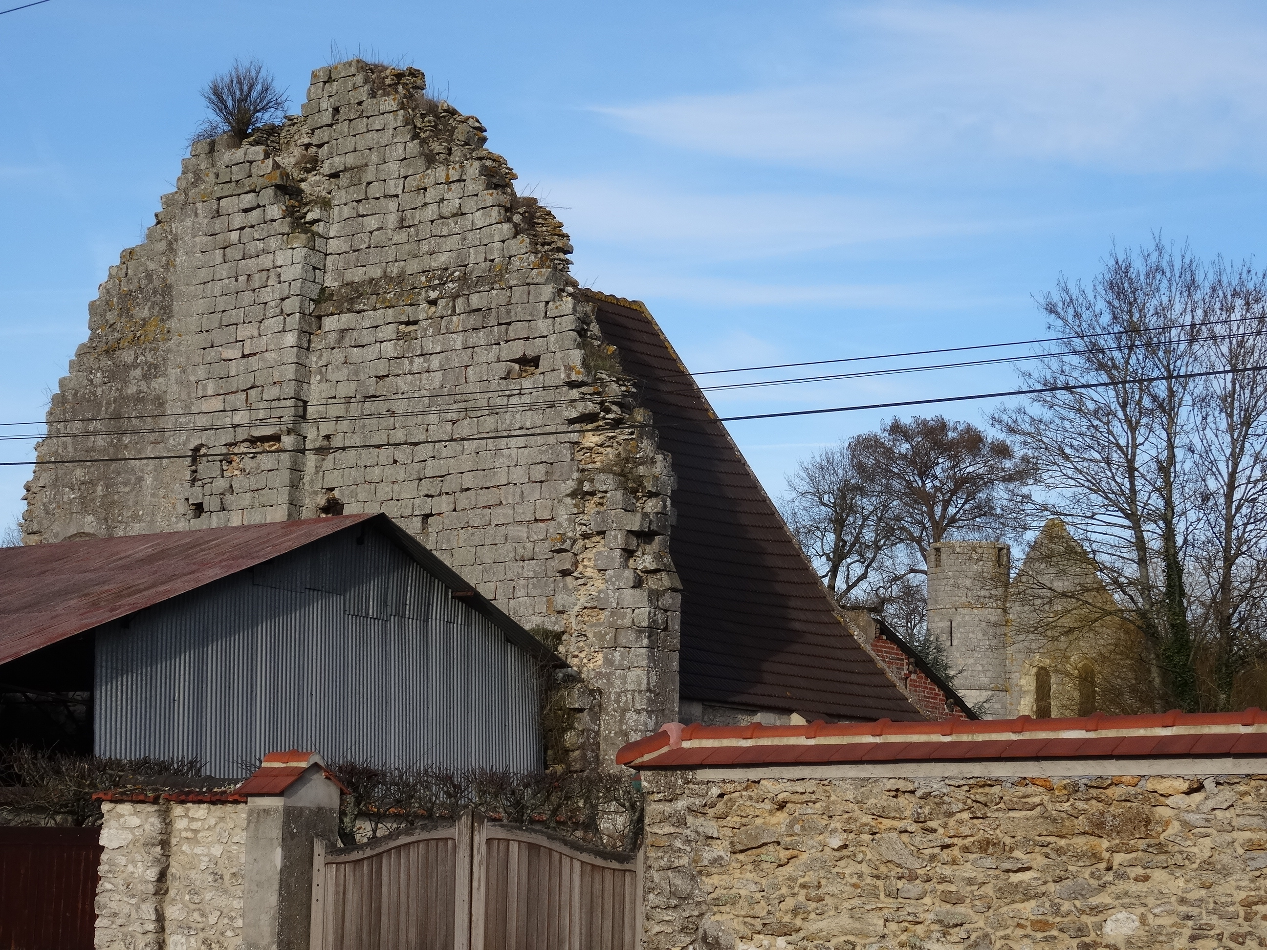 Ruines du Château de Becoiseau à Mortcerf. (Seine-et-Marne, région Île-de-France).